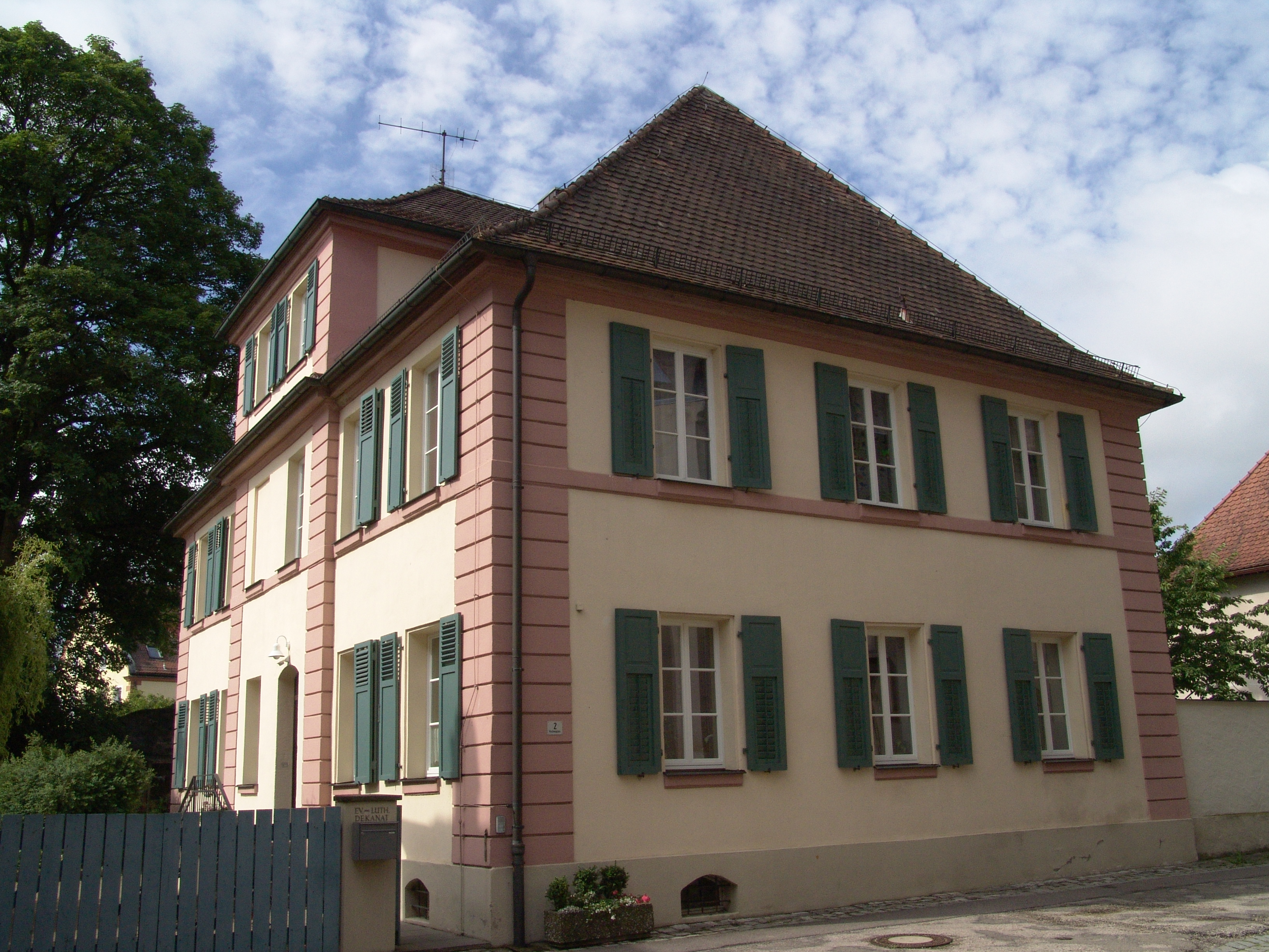 Evangelisch-Lutherisches Dekanatsamt Leuterhausen